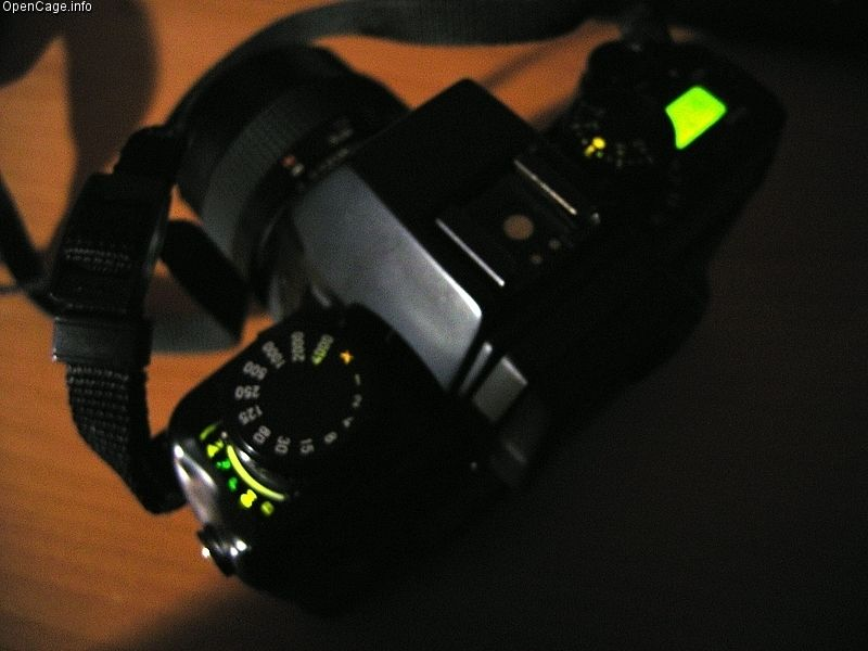 コンタックス ST イルミネーション点灯状態